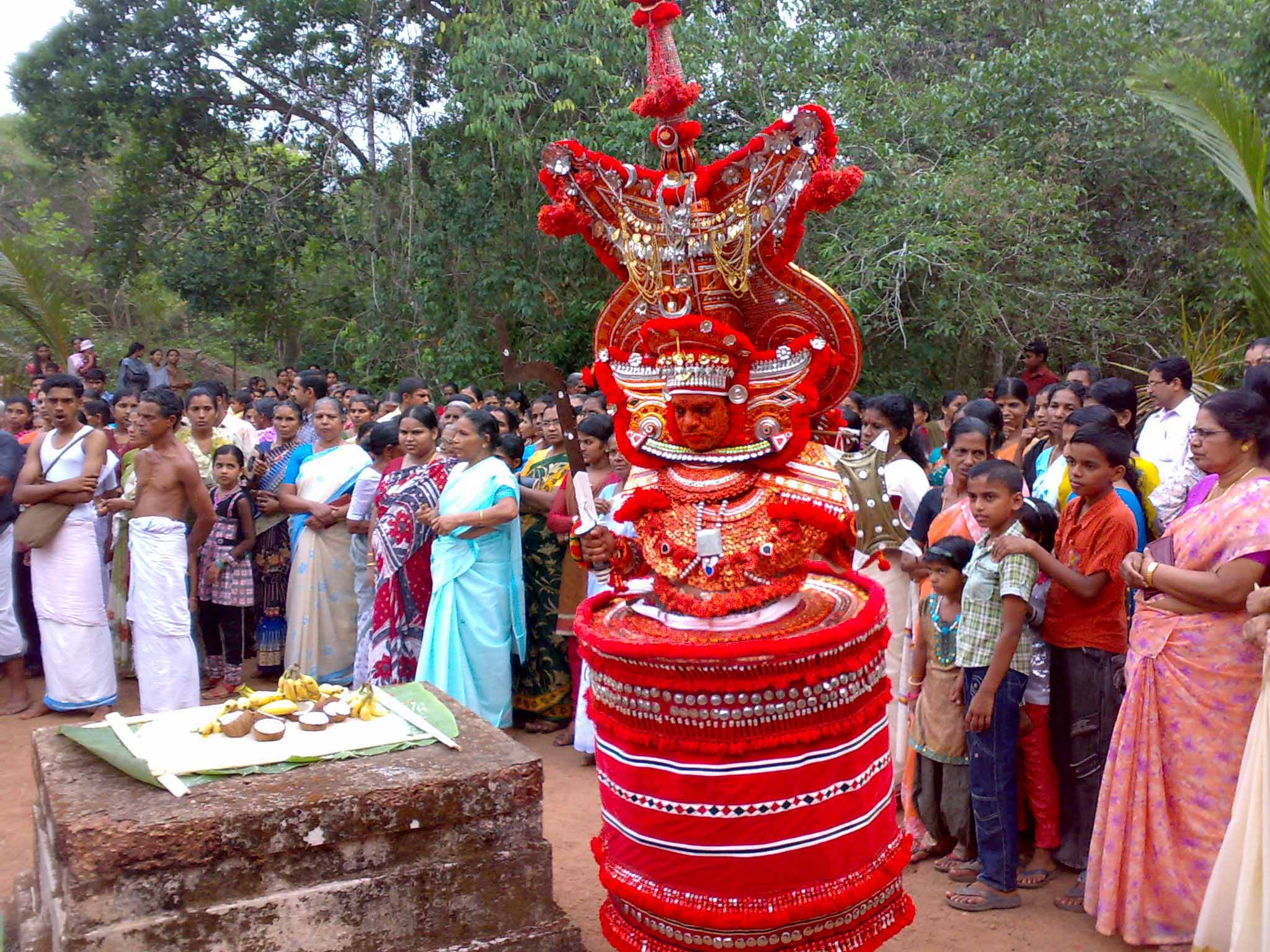 Daivathar photo 1